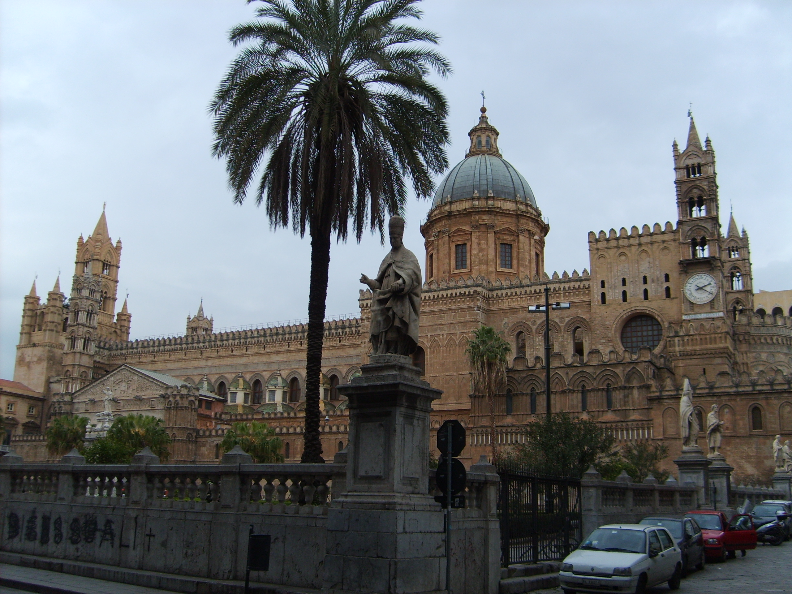 cattedrale di Palermo